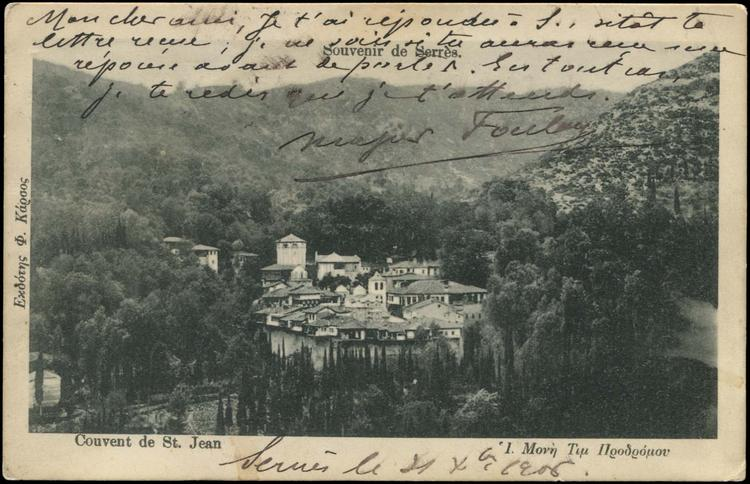 Серският манастир "Свети Йоан Предтеча"